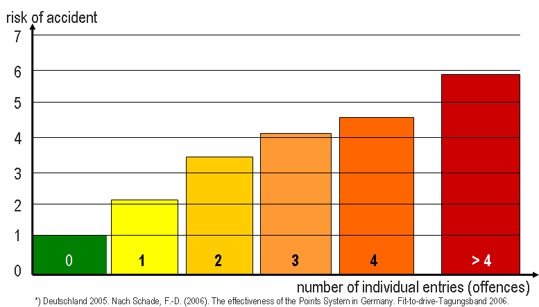 Risiko von Verkehrsunfällen.